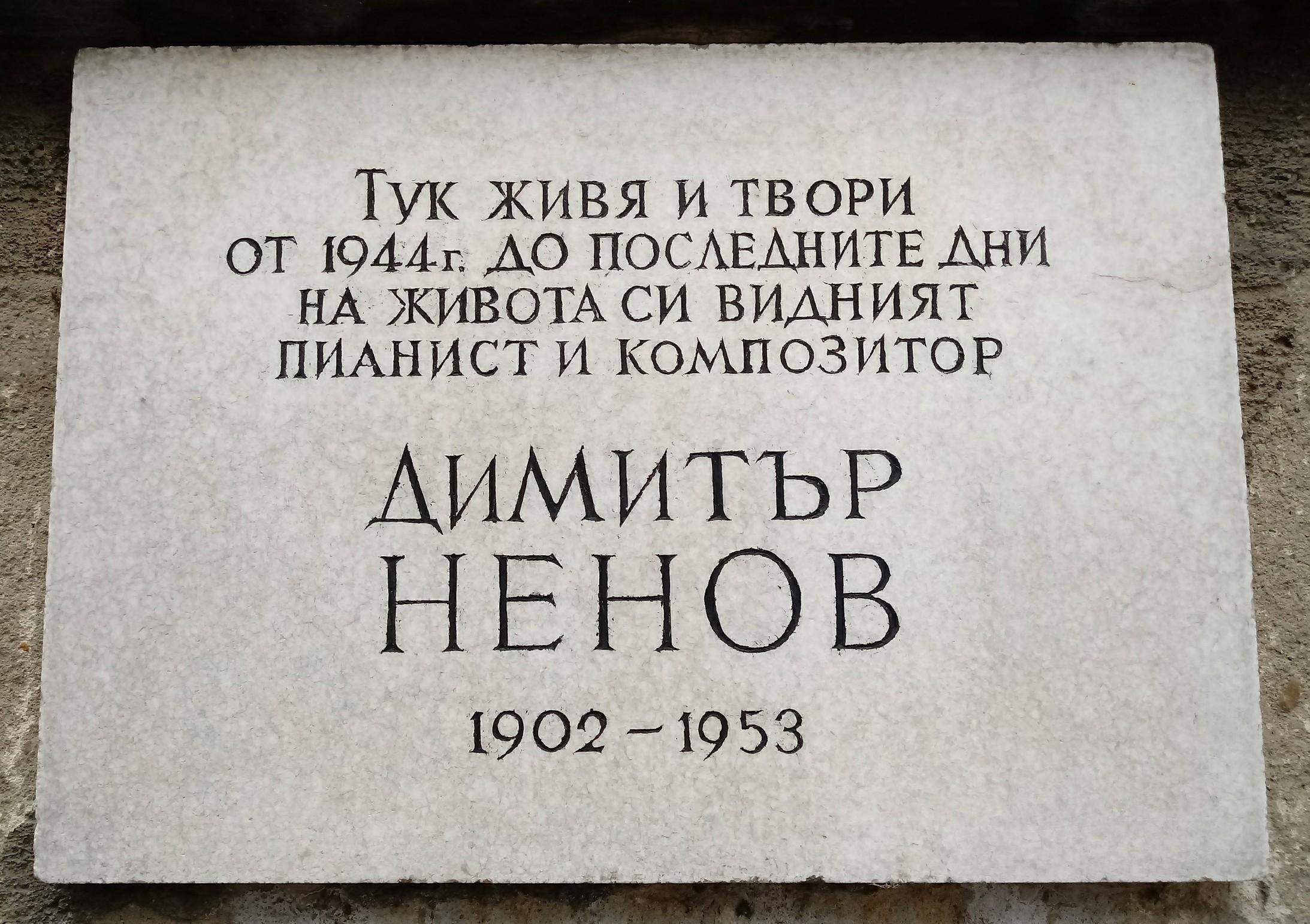 Dimitar Nenov memorial plaque, 7A Bistritsa Str., Sofia